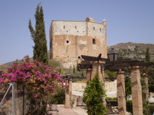 Chateau arabe de Velez de Benaudalla